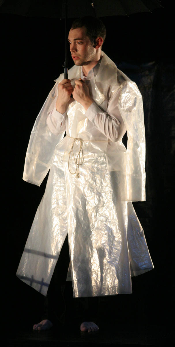 Актёр Саратовского академического театра драмы Григорий Алексеев в спектакле «Записки сумасшедшего»